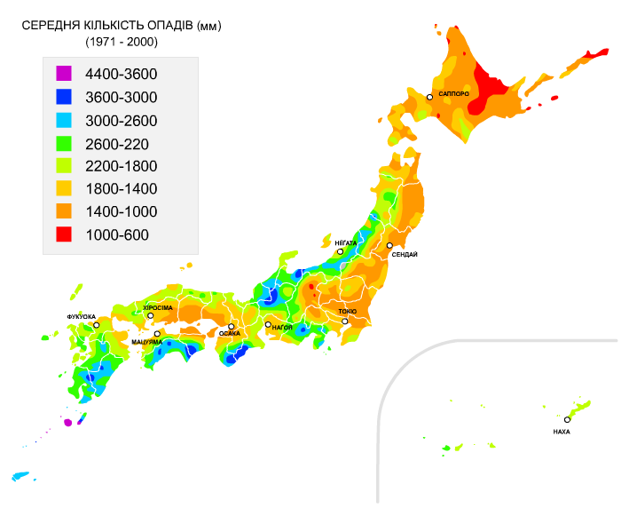 Середня кількість опадів в Японії (1971 — 2000)